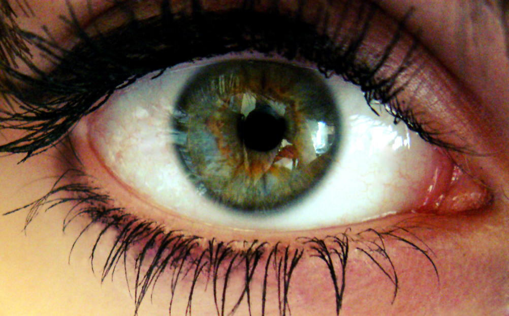 Zentrale Heterochromie: Grüne Iris, um die Pupille herum jedoch ein braun-gelber Ring